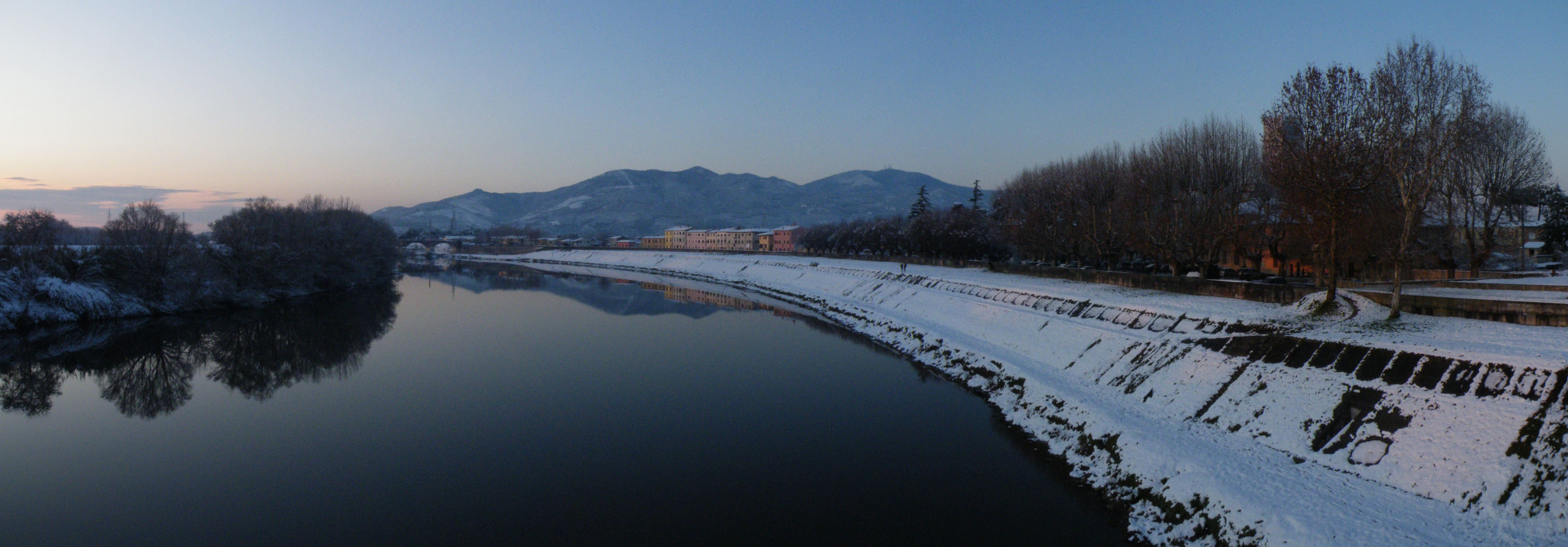 Il lungarno di Calcinaia durante la nevicata di fine dicembre 2009